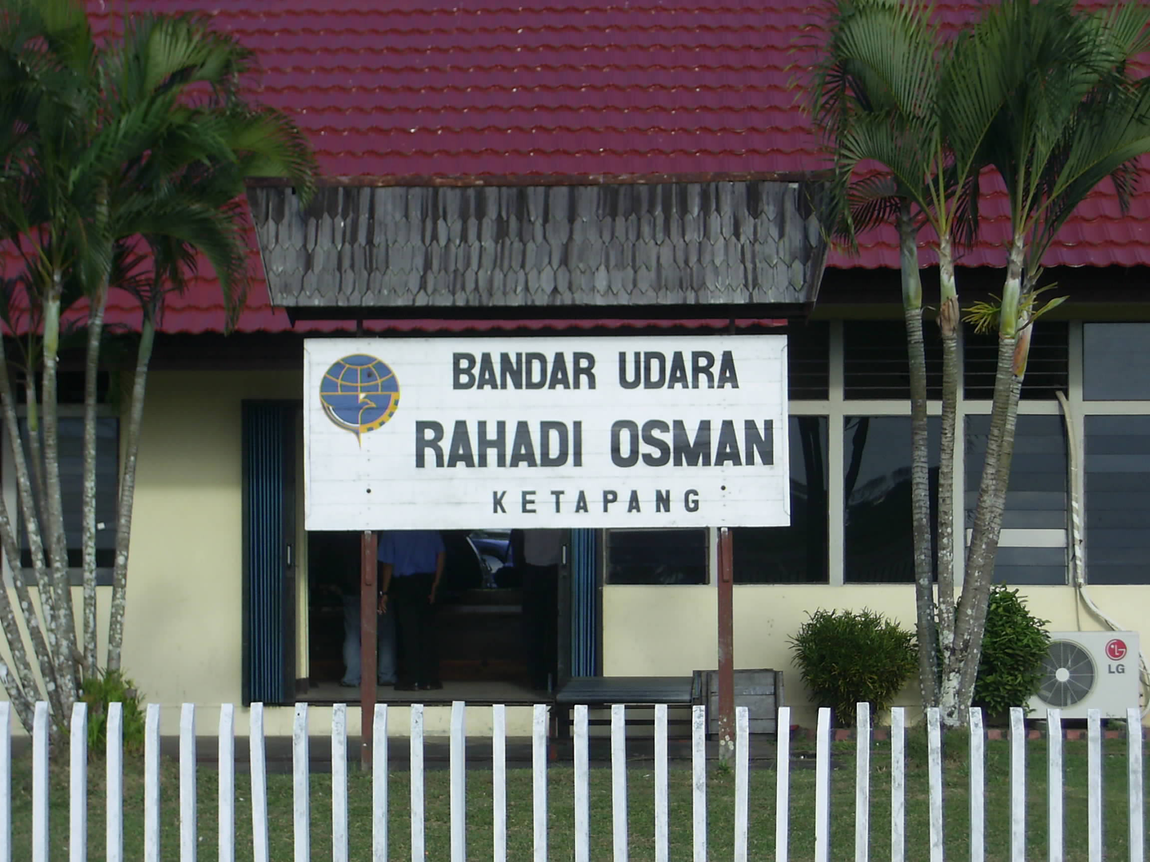 Ketapang Rahadi Osman Airport, West Kalimantan, Indonesia